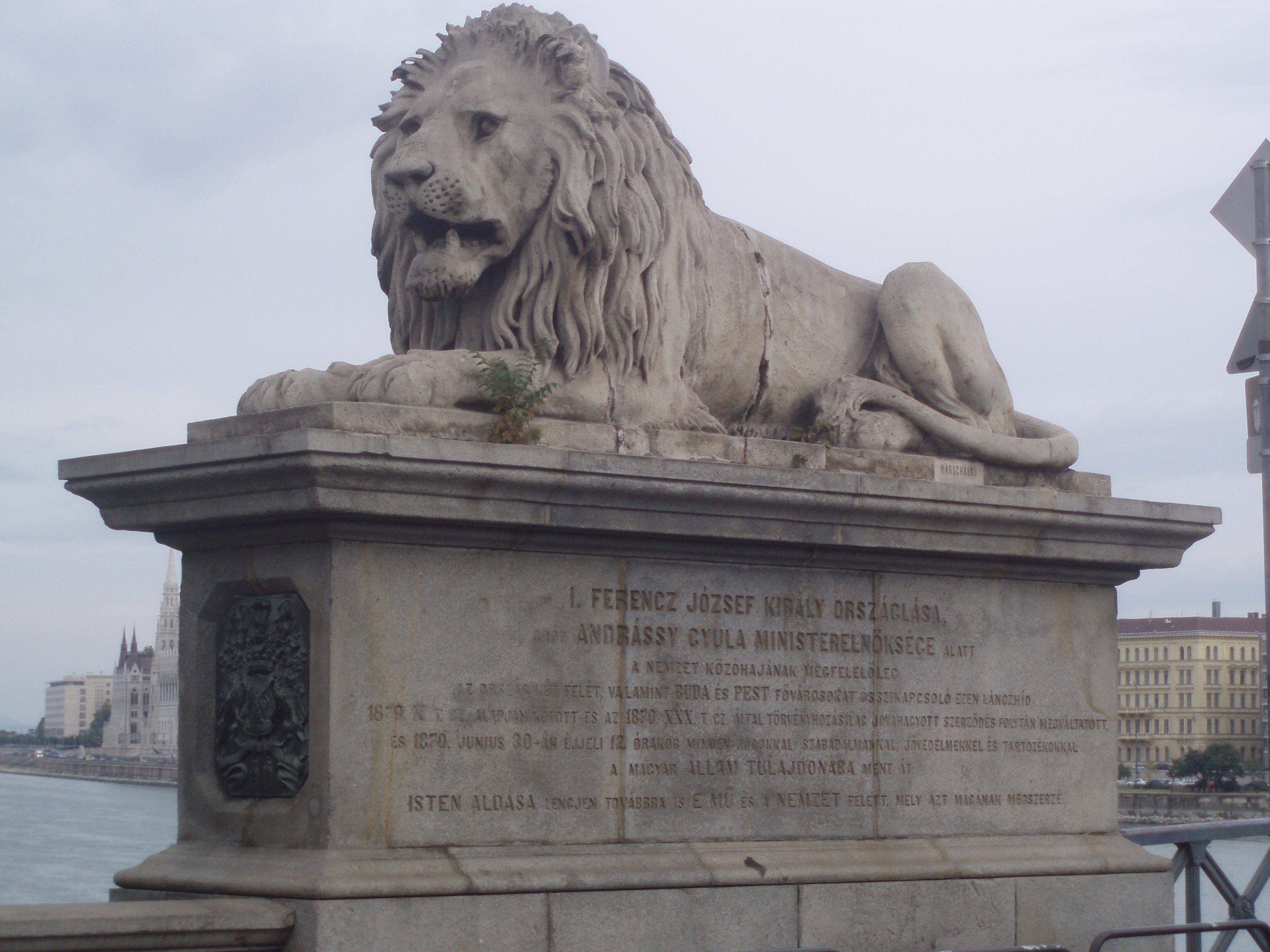 A Lánchíd budai hídfőjénél található északi oroszlán